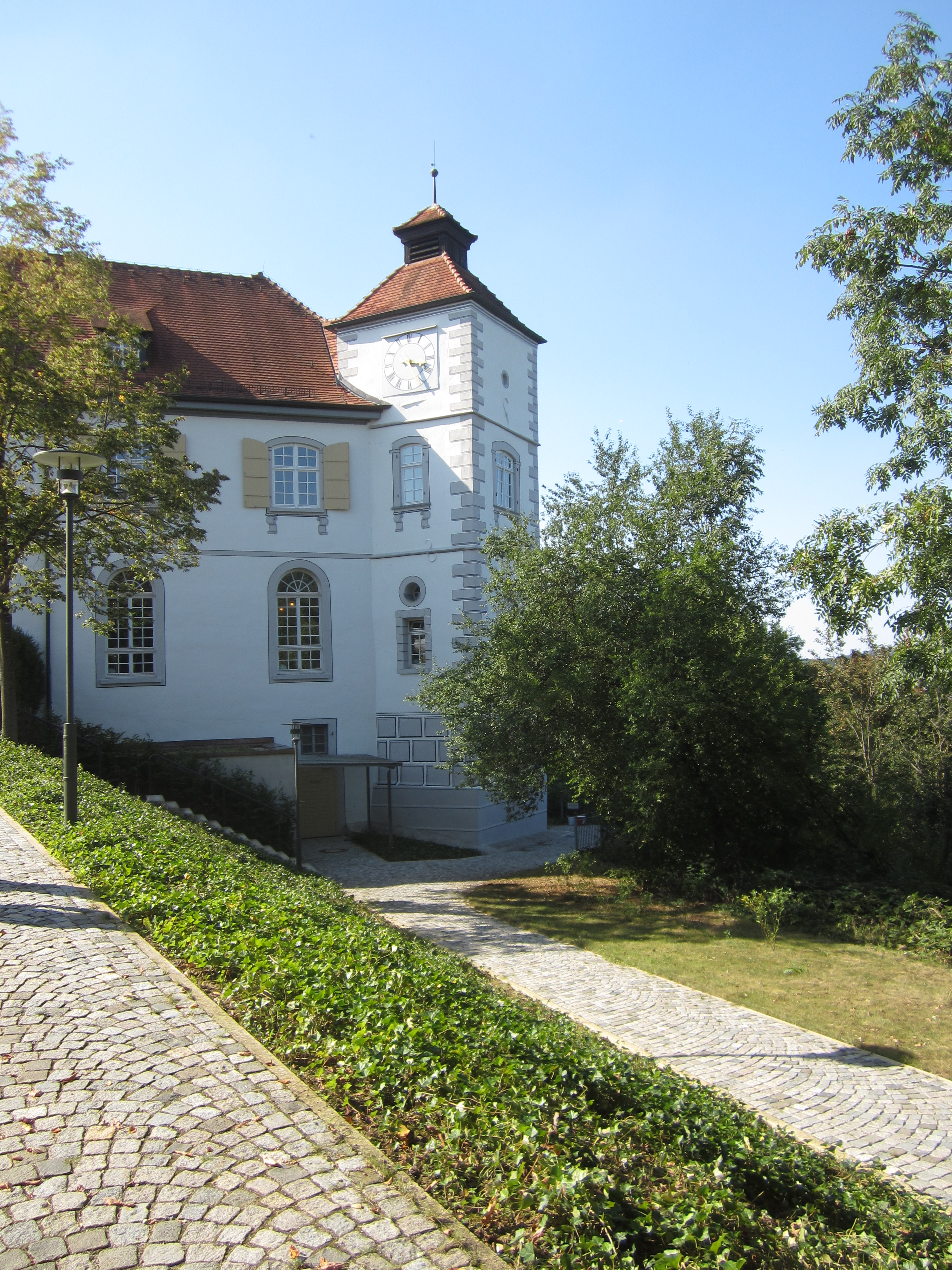 Schloss Filseck in Göppingen-Faurndau; Nordost-Turm